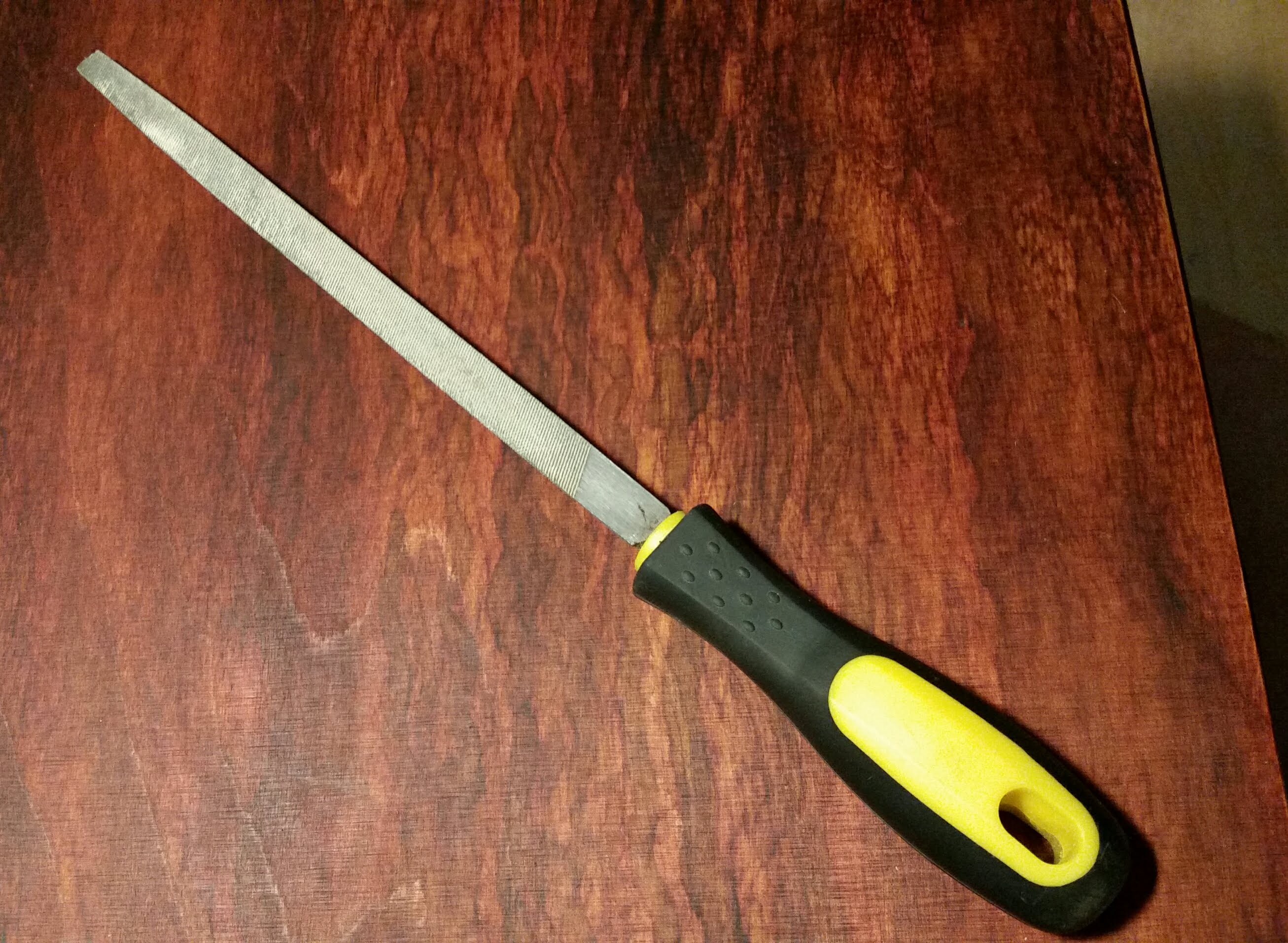 Reszelő (szerszám) fa felületen.